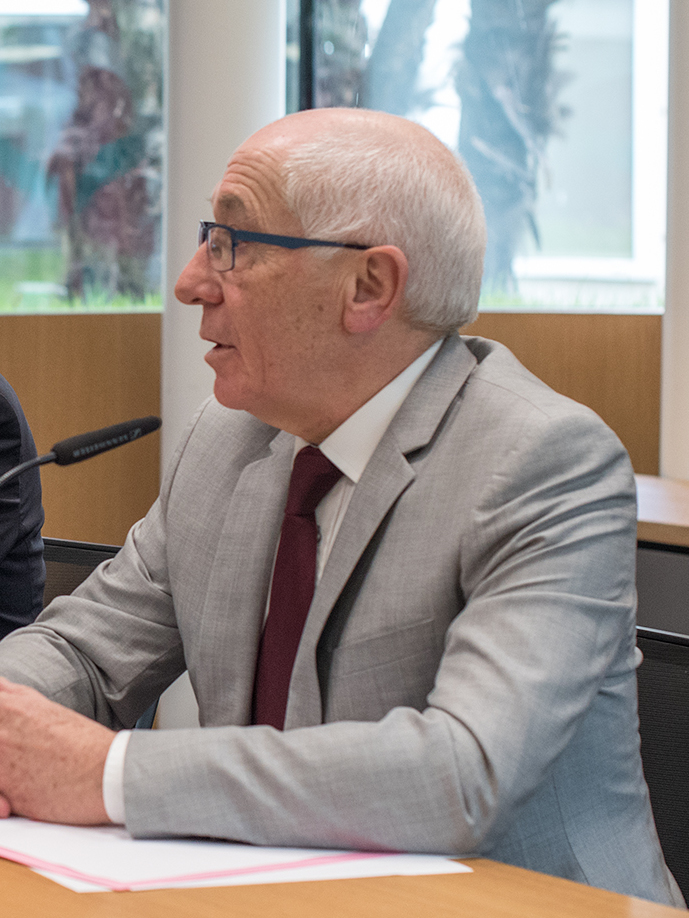 Lehendakaria Euskal Hirigune Elkargoaren presidentearekin batzartuko da